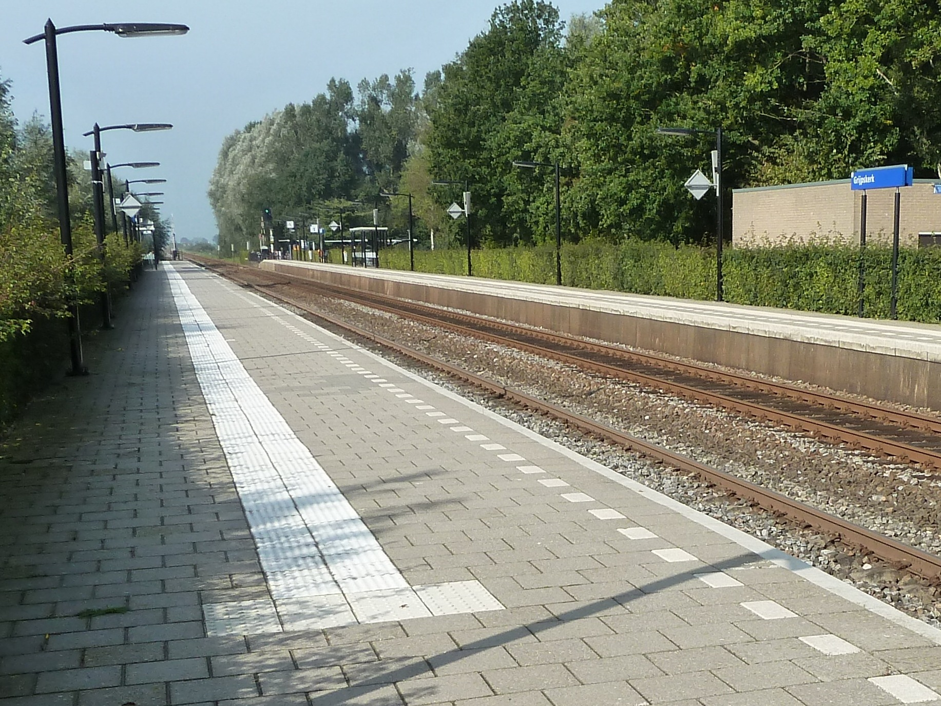 Station Grijpskerk